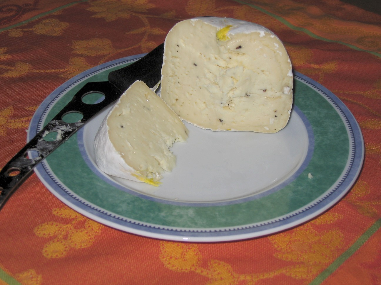 Gaperon, französischer Käse aus der Auvergne.